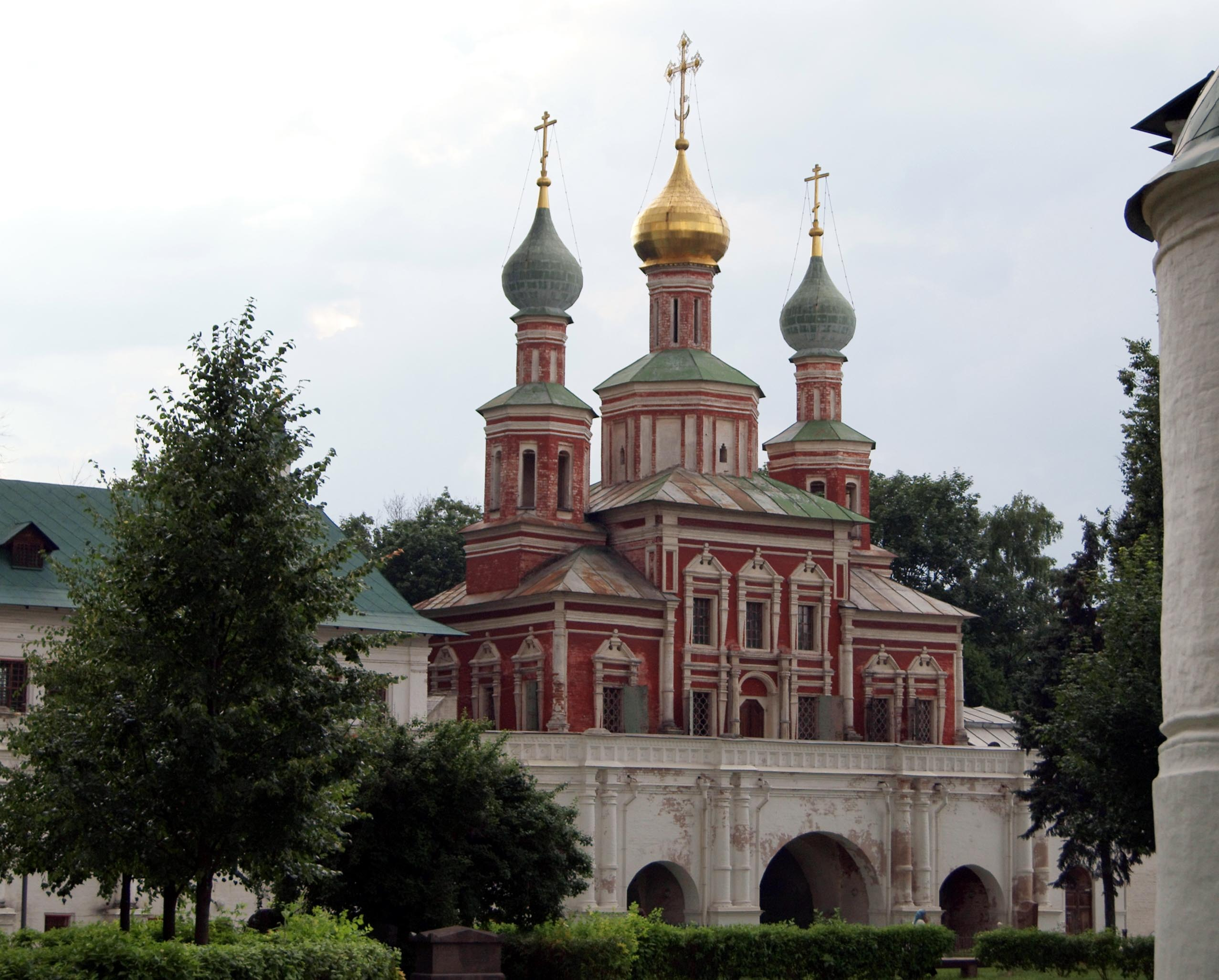 Built in 1683-1688